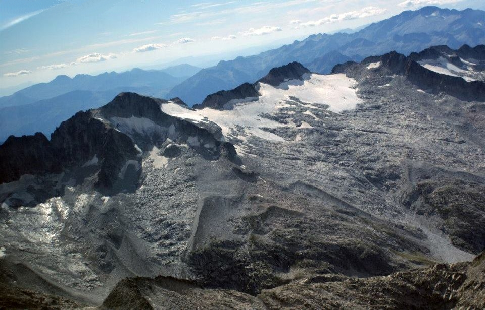 Pic d'Aneto et son glacier vue d'avion